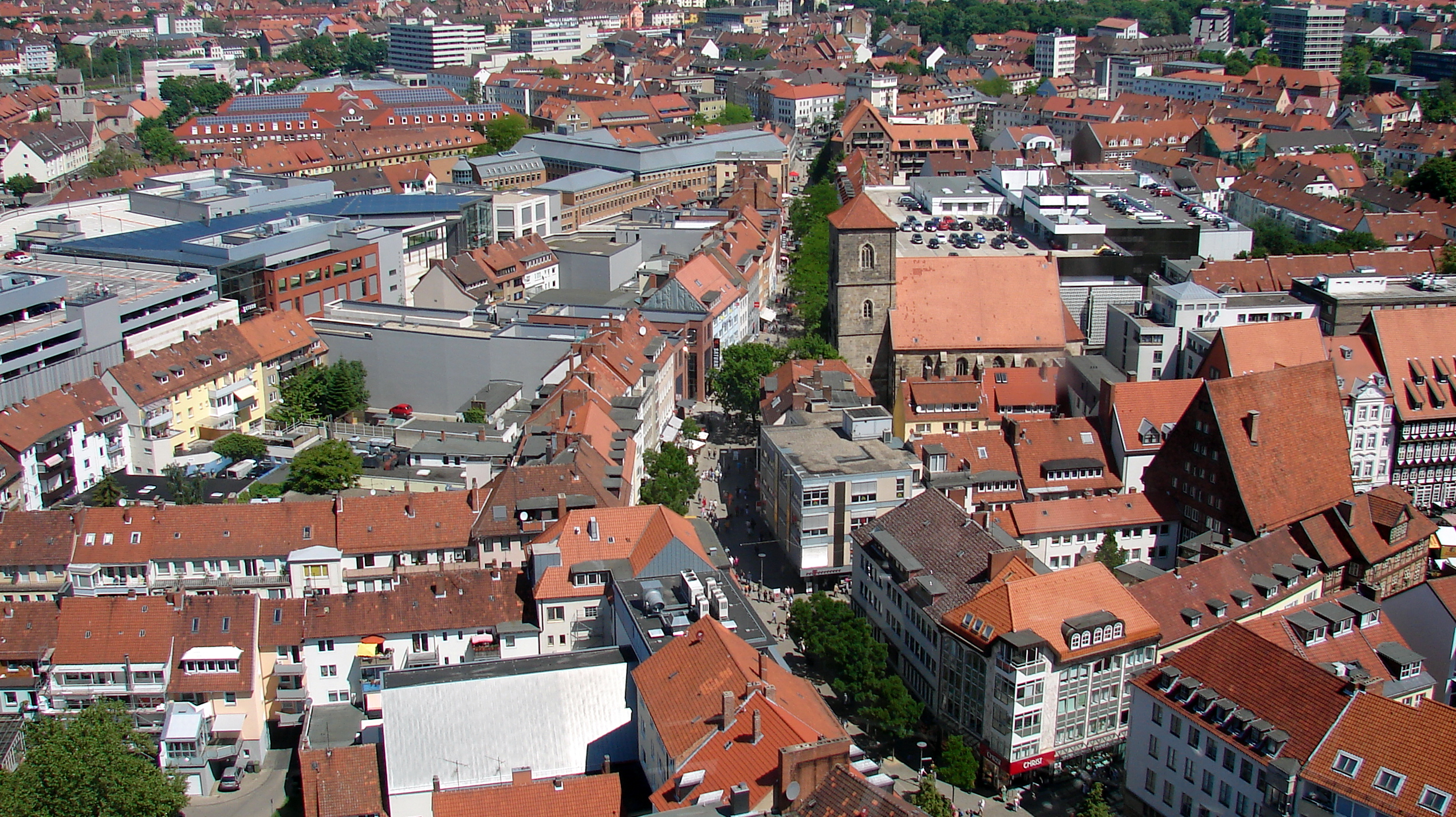 Die Hildesheimer Innenstadt. Blick von der Andreaskirche nach Norden auf die Fußgängerzone (Hoher Weg/Almsstraße). In der Mitte die Kirche St. Jakobi.